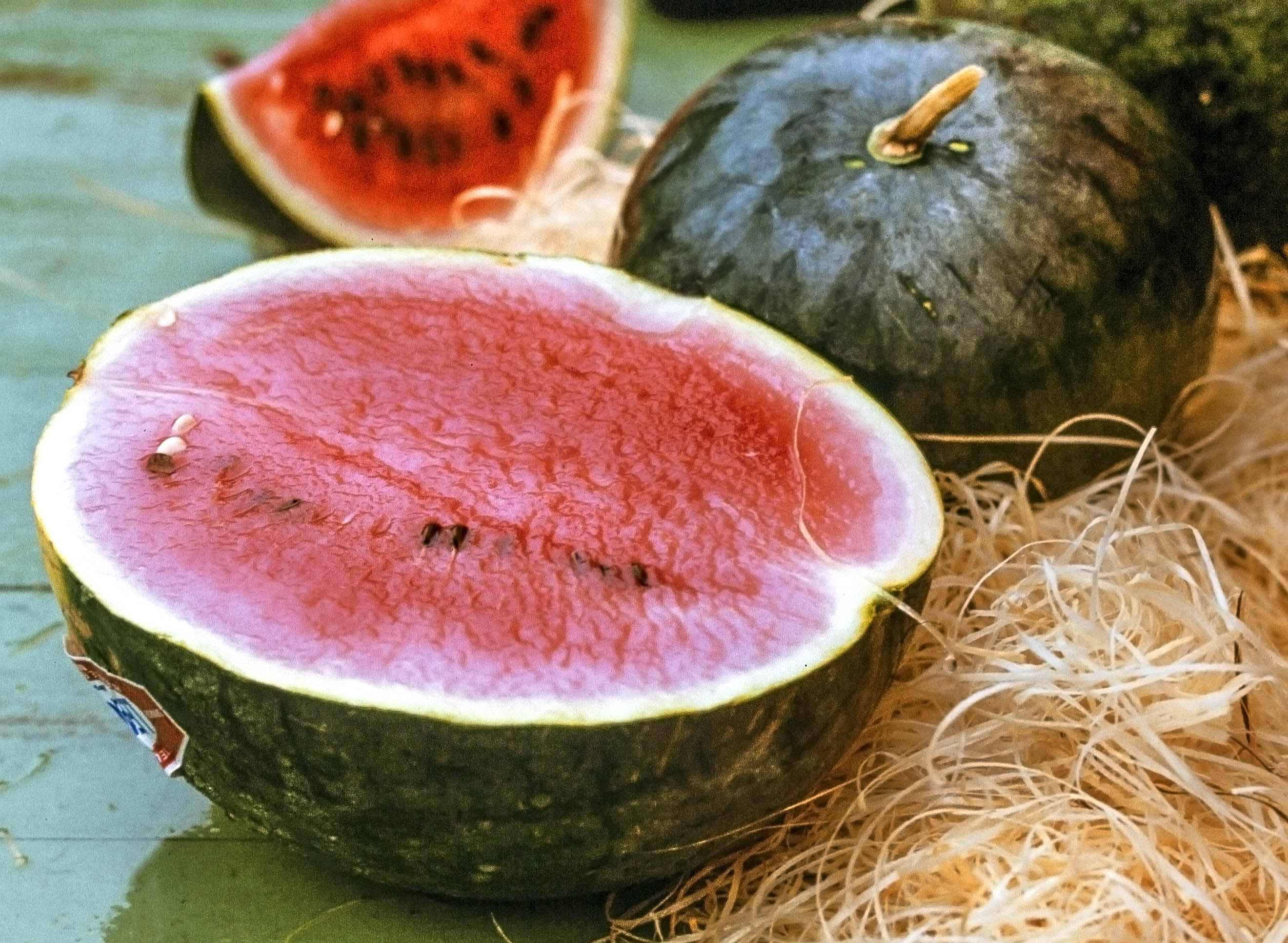 Vattenmelon